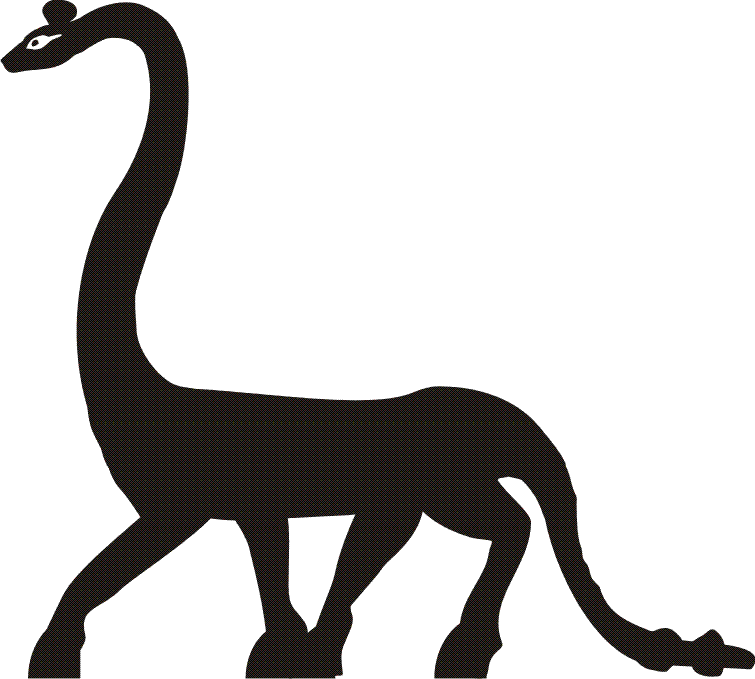 Serpopard (Schlangenhalspanther)